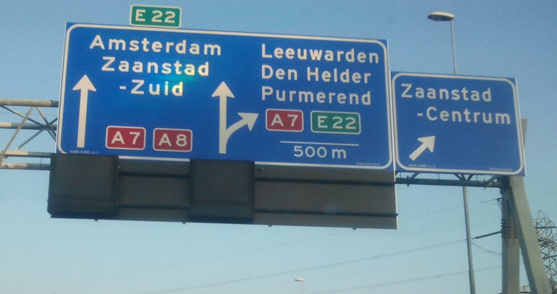 Bewegwijzering die aanduidt dat de autosnelweg van knooppunt Zaandam richt Amsterdam de beide nummers A7 en A8 heeft.